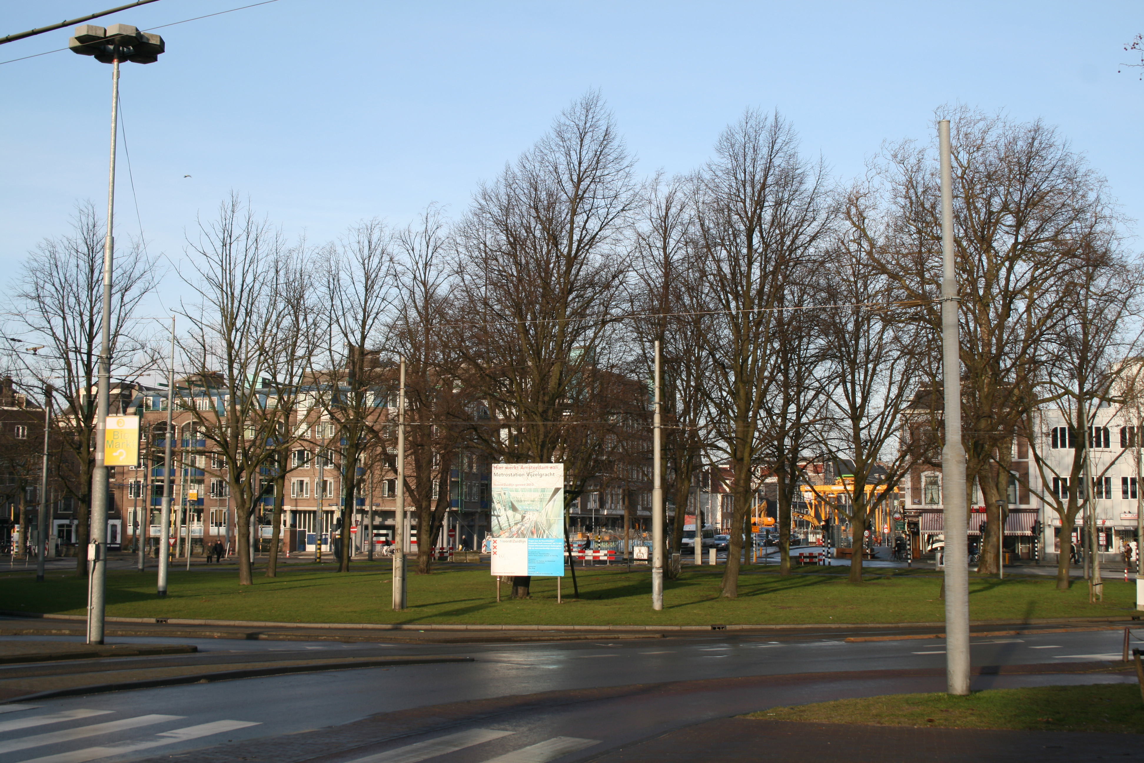 Weteringplantsoen, Amsterdam, Holland.